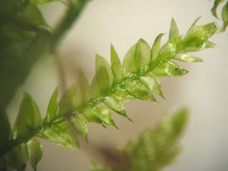 Gezähneltes Schiefbüchsenmoos (Plagiothecium denticulatum), Habitus bei 30x Vergr., Rostock